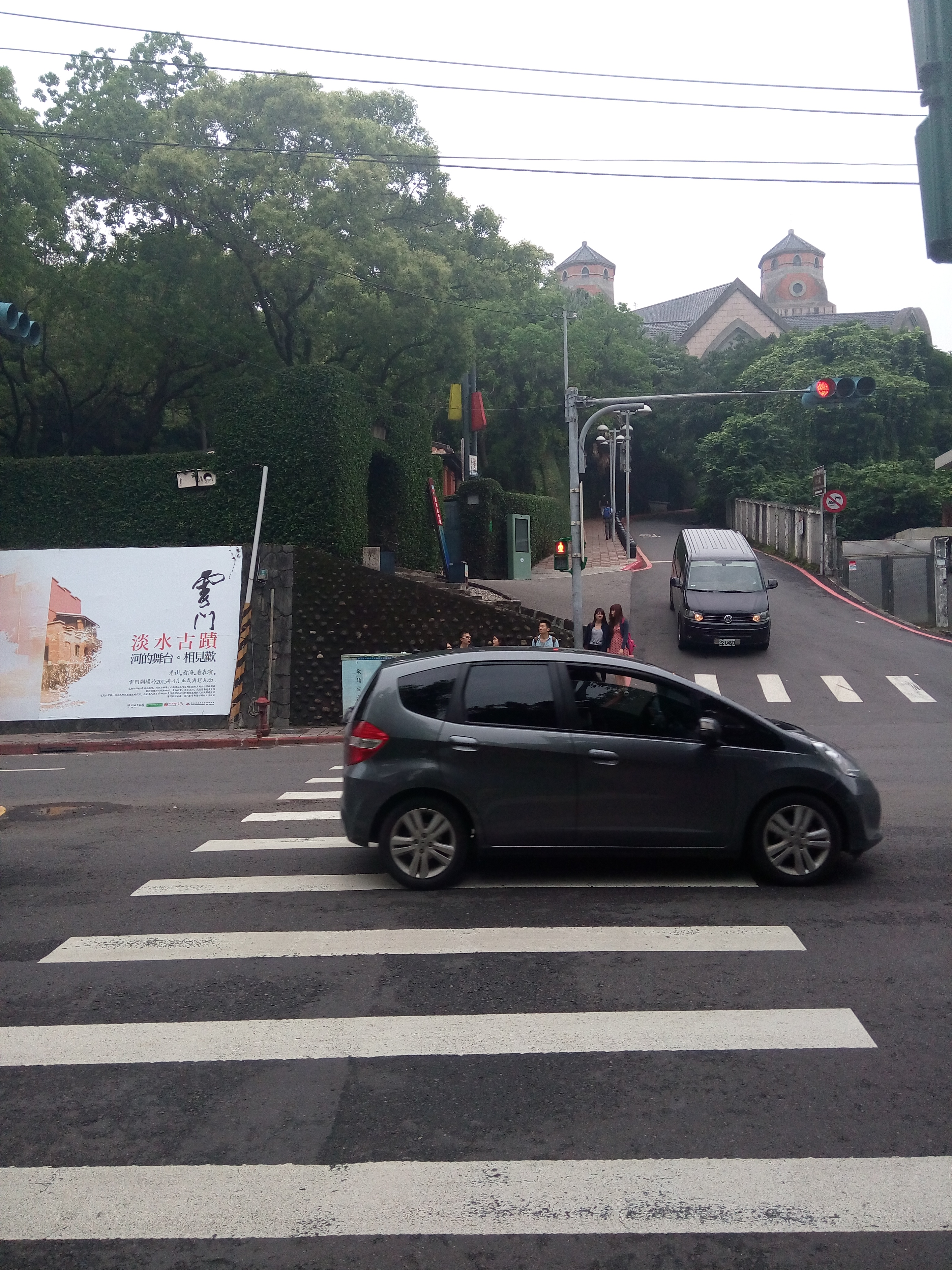 中文（台灣）: 真理大學下坡處，與紅毛城、海關碼頭近鄰。